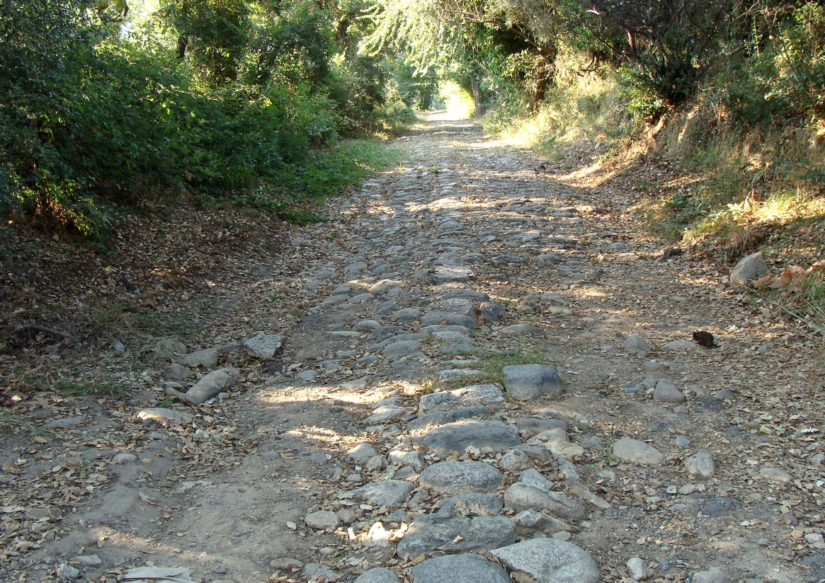 Le chemin dit "Strada romana soprana", au sud de la commune de Prunelli-di-Fiumorbo (Haute-Corse). Pourrait avoir été un tronçon d'une voie romaine parcourant la plaine orientale de Corse, ou une voie secondaire locale.